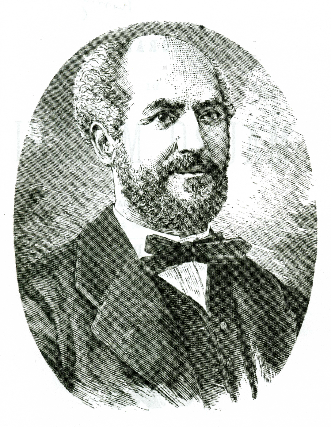 Ritratto a stampa di Mauro Macchi